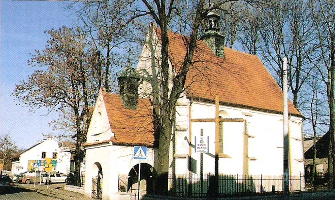 Skawina - kościół filialny pw. Nawiedzenia NMP